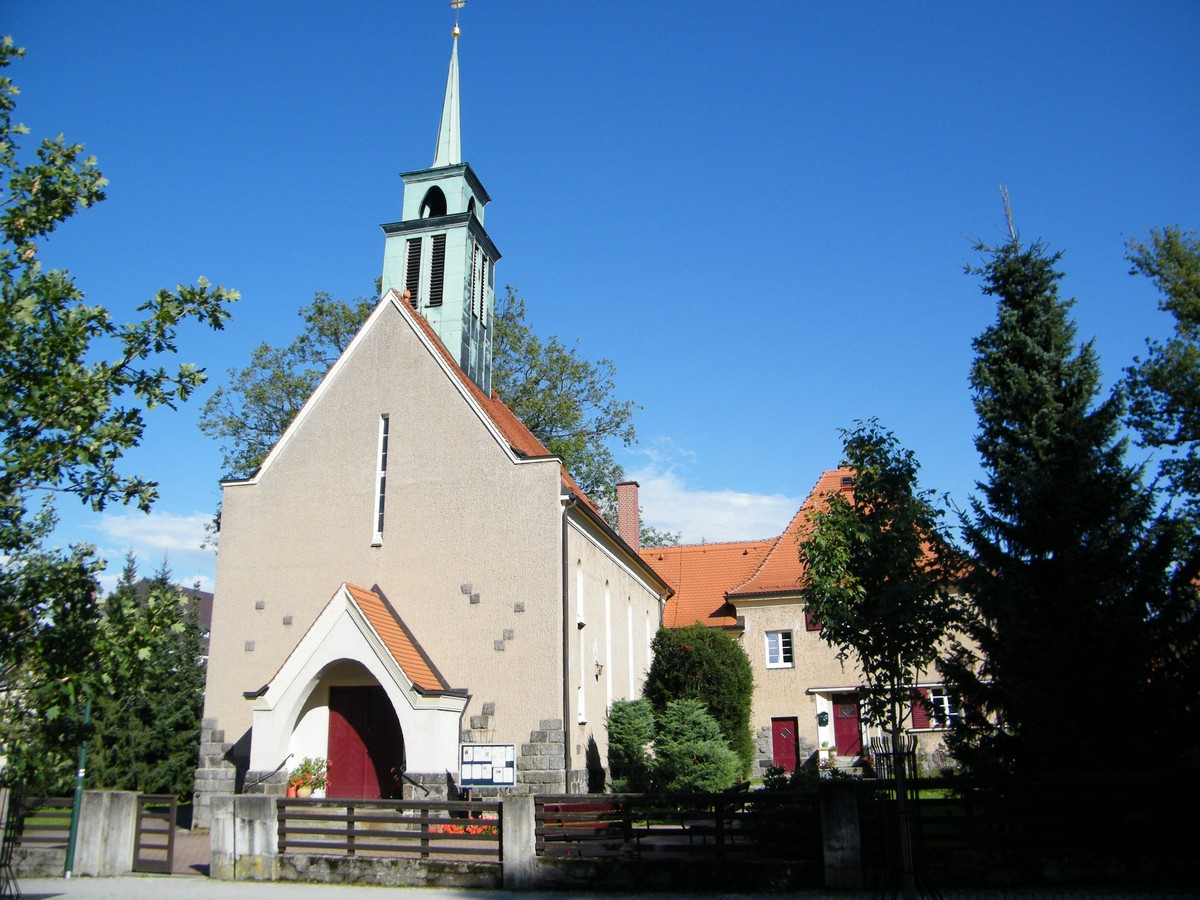 Katholische Pfarrkirche St. Gertrud, Neustadt in Sachsen